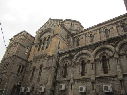 מסגד אל-רחמה